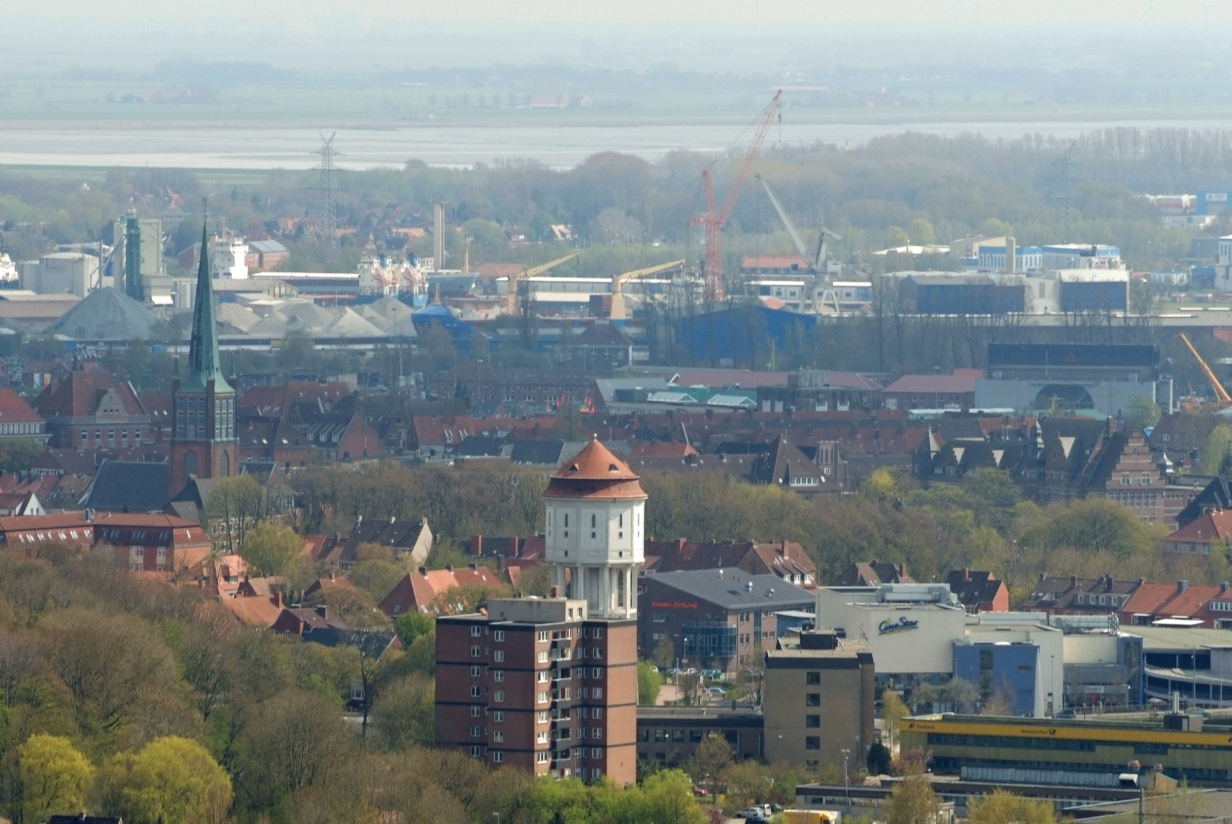 Fotoflug von Nordholz-Spieka nach Oldenburg und Papenburg